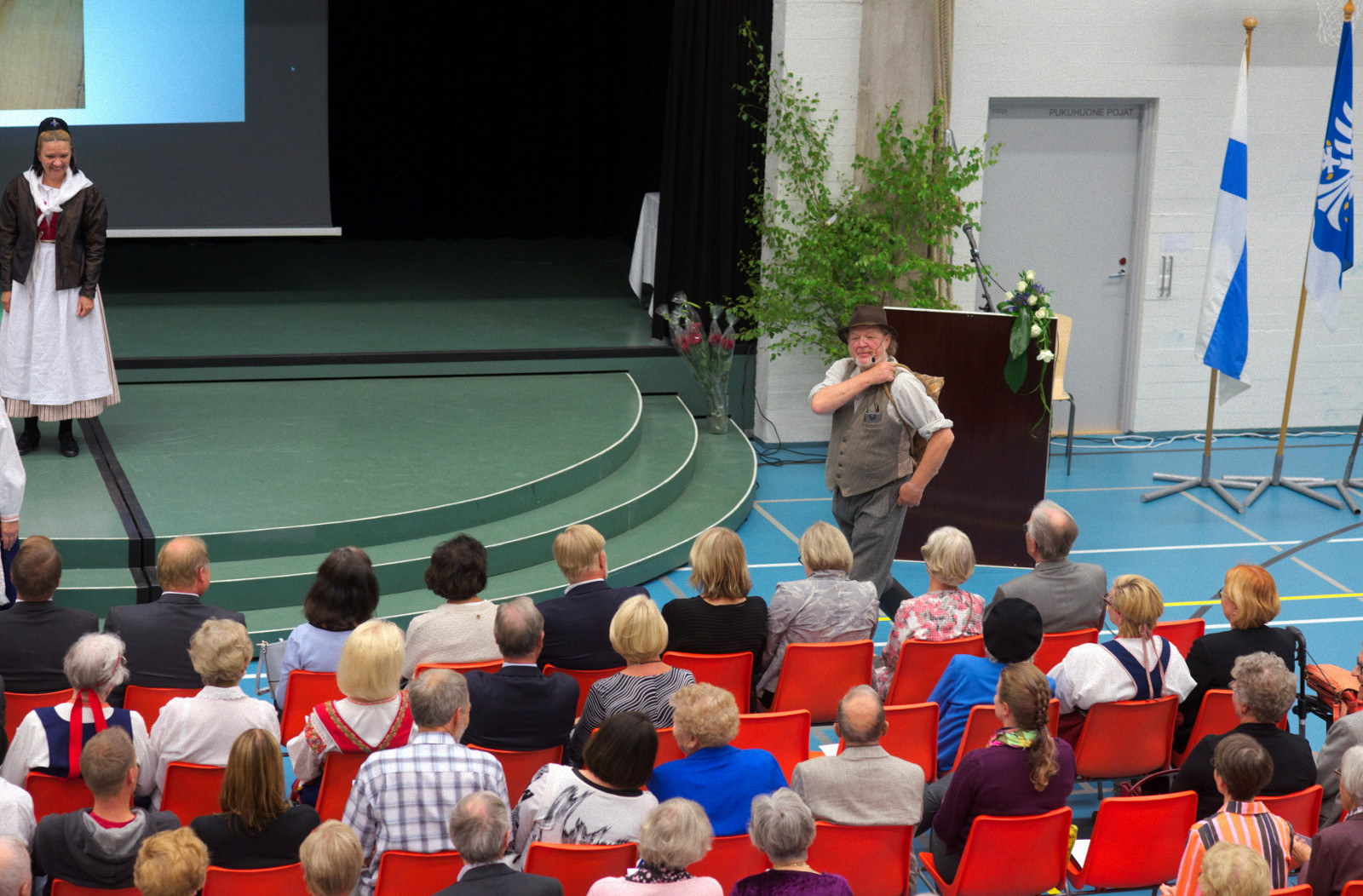 Pekka Saaristo "Paskojan Eeverttinä" Johannes-juhlilla 5.8.2017 Paimiossa.